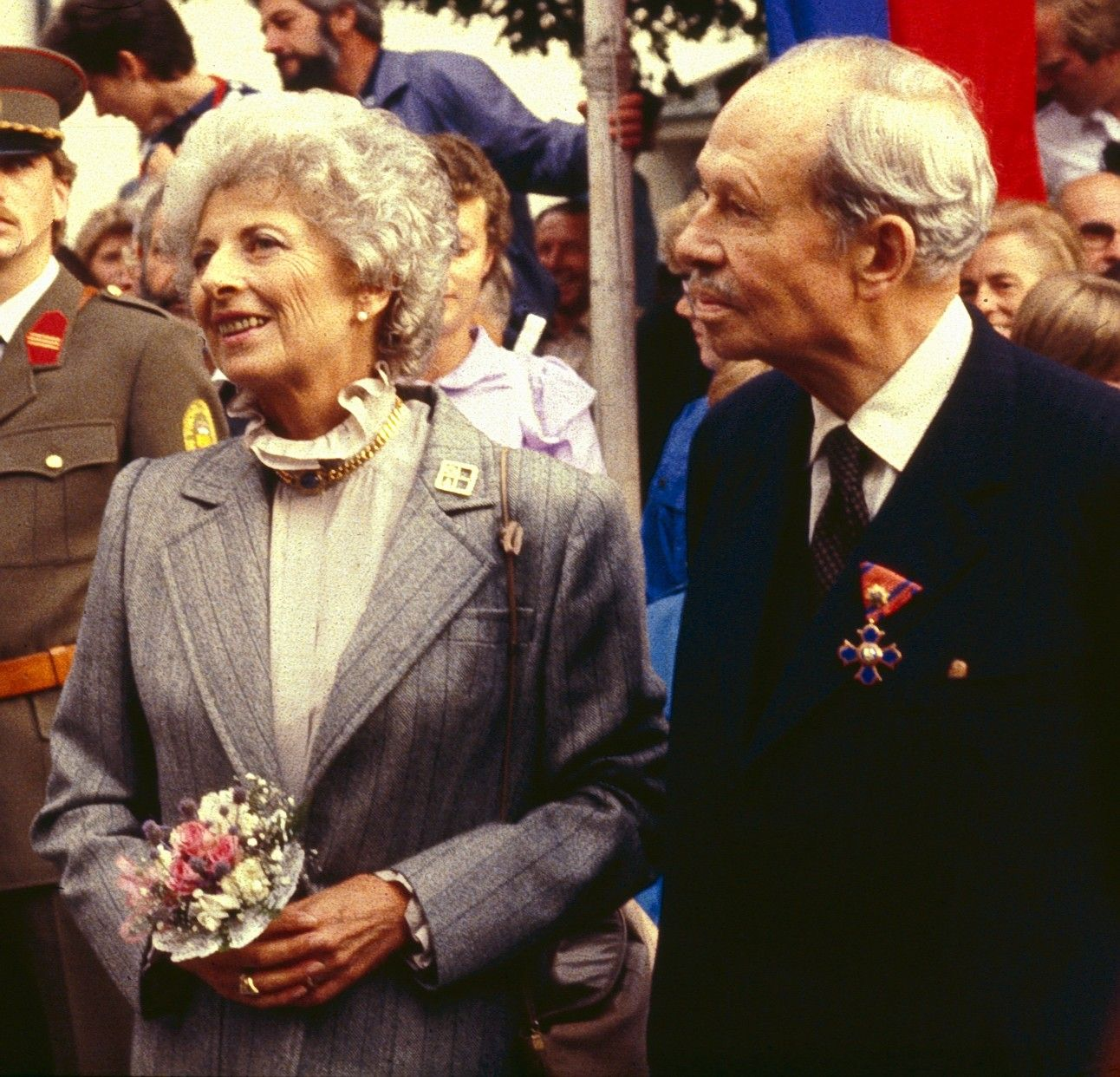 Fürst Franz Josef II. von und zu Liechtenstein mit seinem Gemalin Fürstin Gina